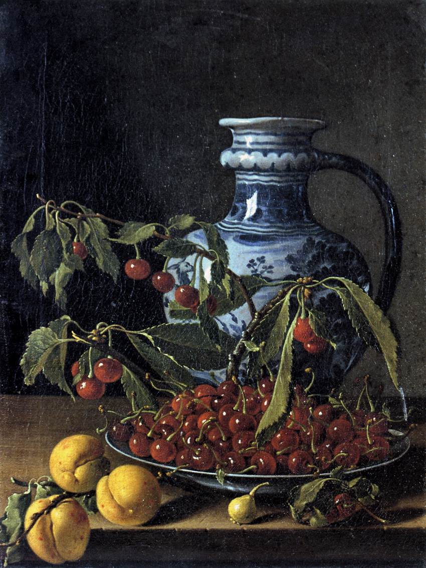 Bodegón con cerezas, albaricoques y una jarra de "loza talaverana" de la "serie de escenas azules" (hacia 1773). Museo de Bellas Artes de Bilbao, Vizcaya (España).